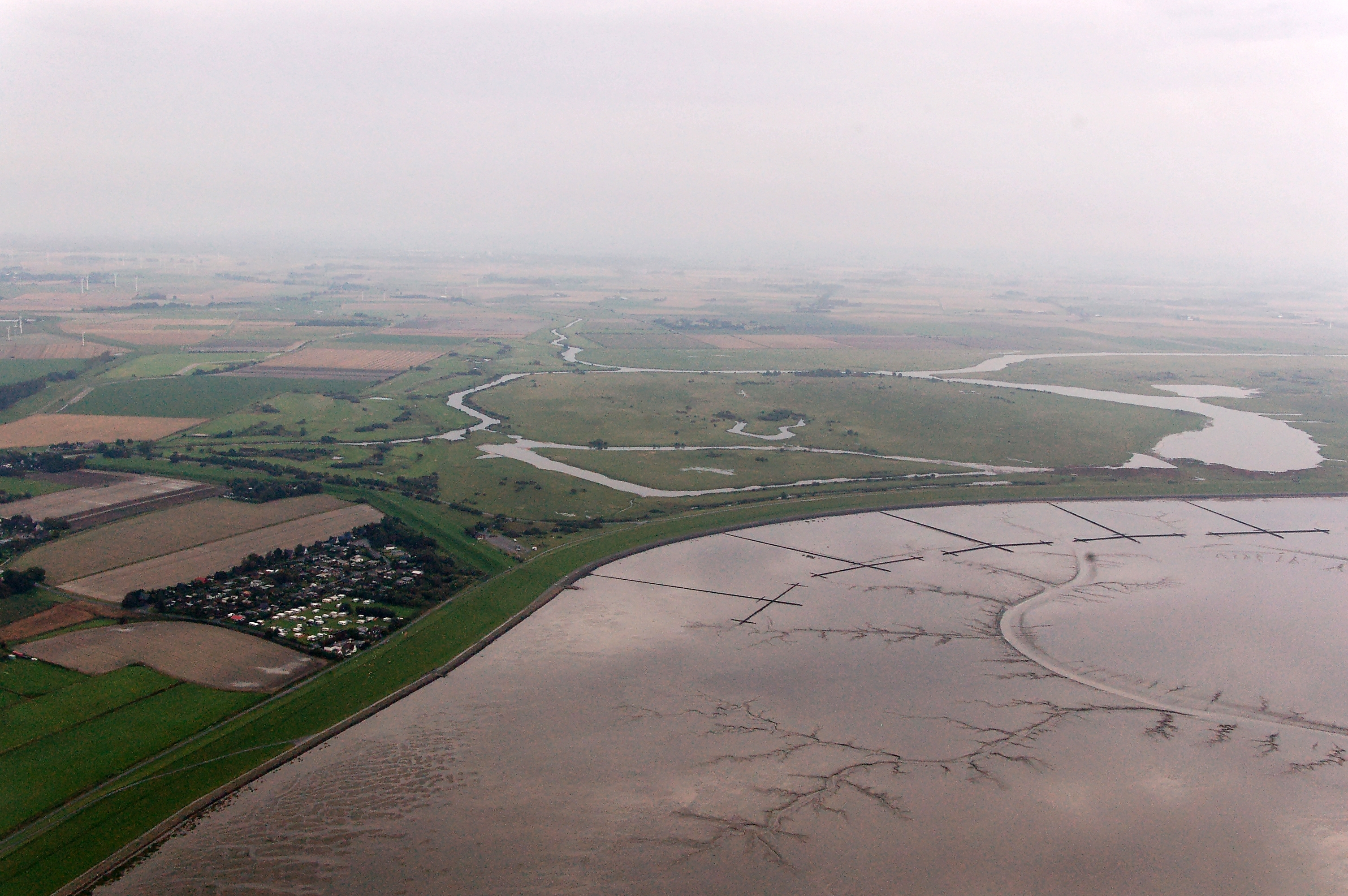 Impressionen Fotoflüge September 2011 (CPB); Nordseeküste mit Warwerort (vorne links) und Gemeindeflächen von Friedrichsgabekoog und Nordermeldorf; NSG Wöhrdener Loch im Speicherkoog, Kreis Dithmarschen, Schleswig-Holstein, Deutschland